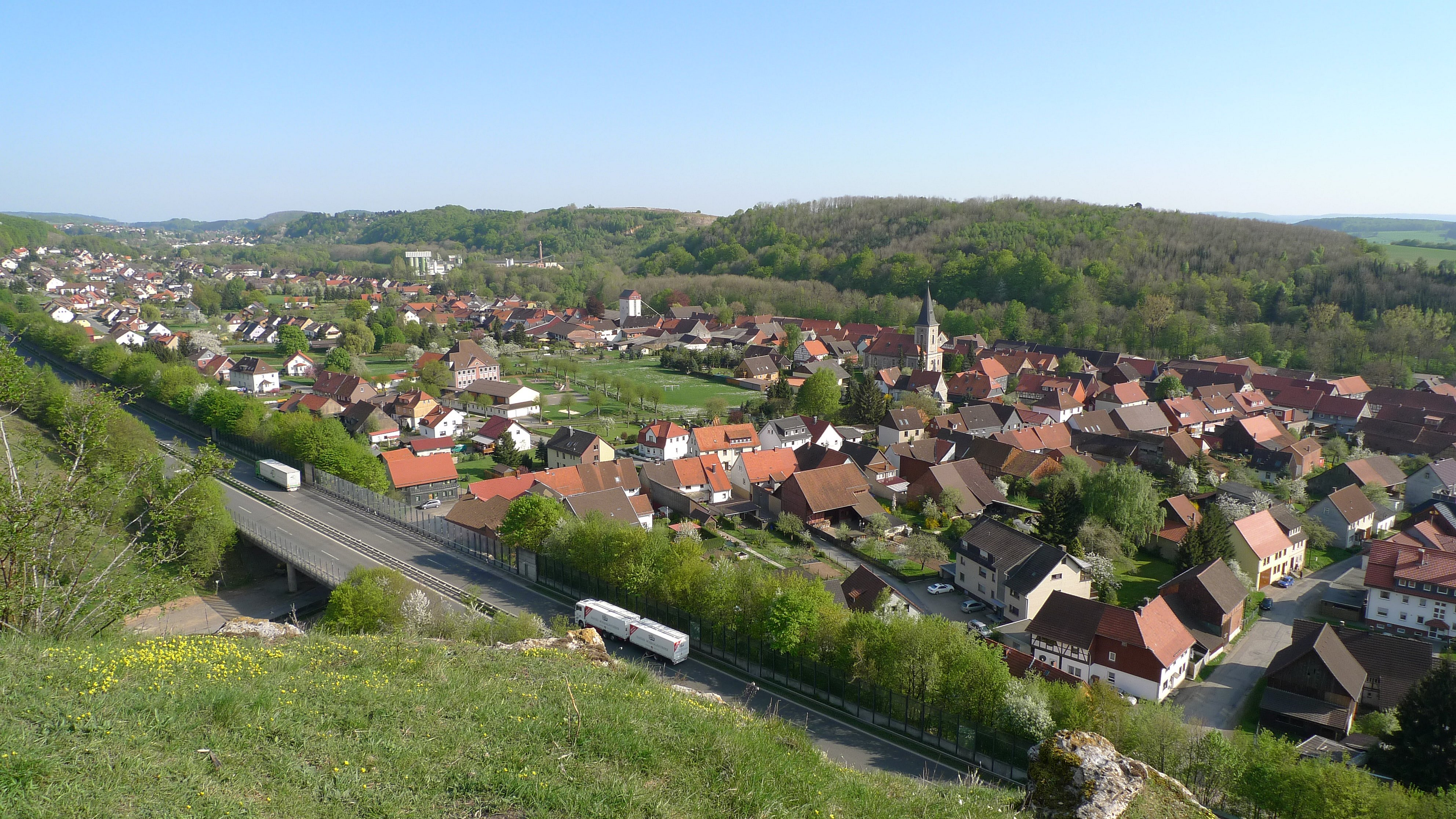 Blick auf Scharzfeld vom Ritterstein